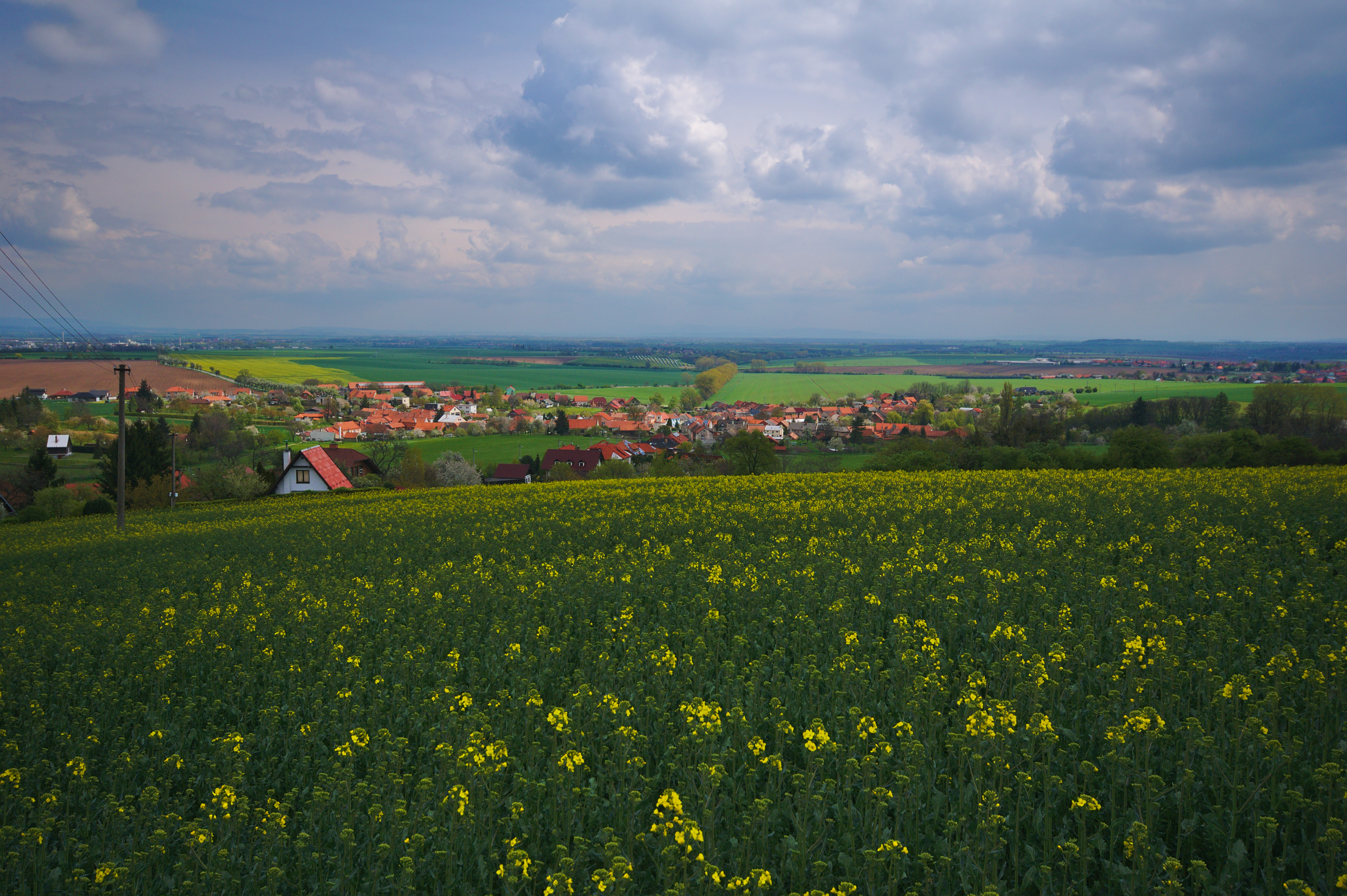 Obec od západu, Seloutky, okres Prostějov